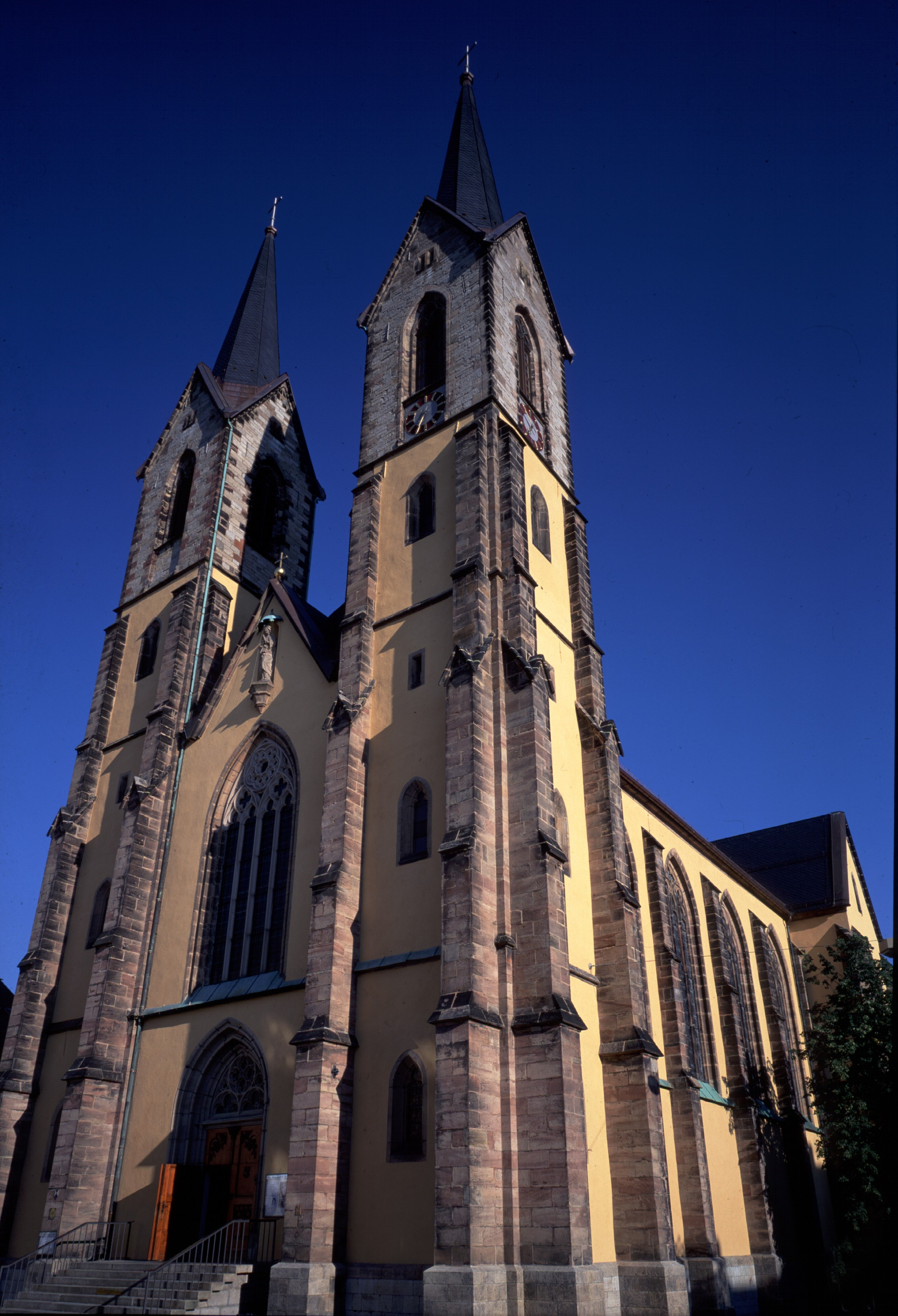 Katholische Stadtpfarrkirche St. Marien in Hof an der Saale